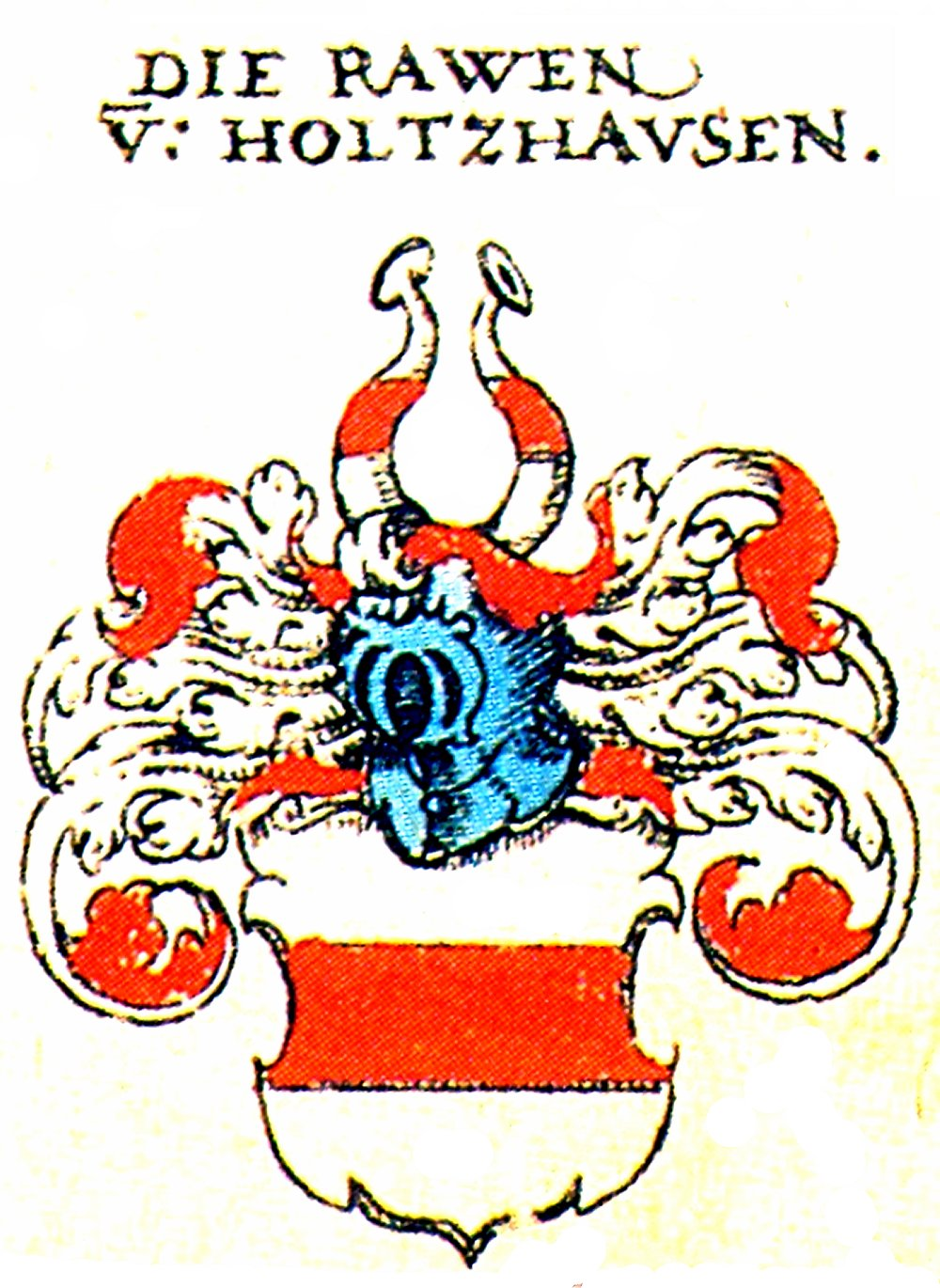 Wappen der :de:Rau von Holzhausen, Ausschnitt aus: Johann Siebmacher: New Wappenbuch, eingescannt aus: Horst Appuhn (Hrsg.), Johann Siebmachers Wappenbuch. Die bibliophilen Taschenbücher 538, 2. verb. Aufl , Dortmund 1989 Hessische, Blatt 137